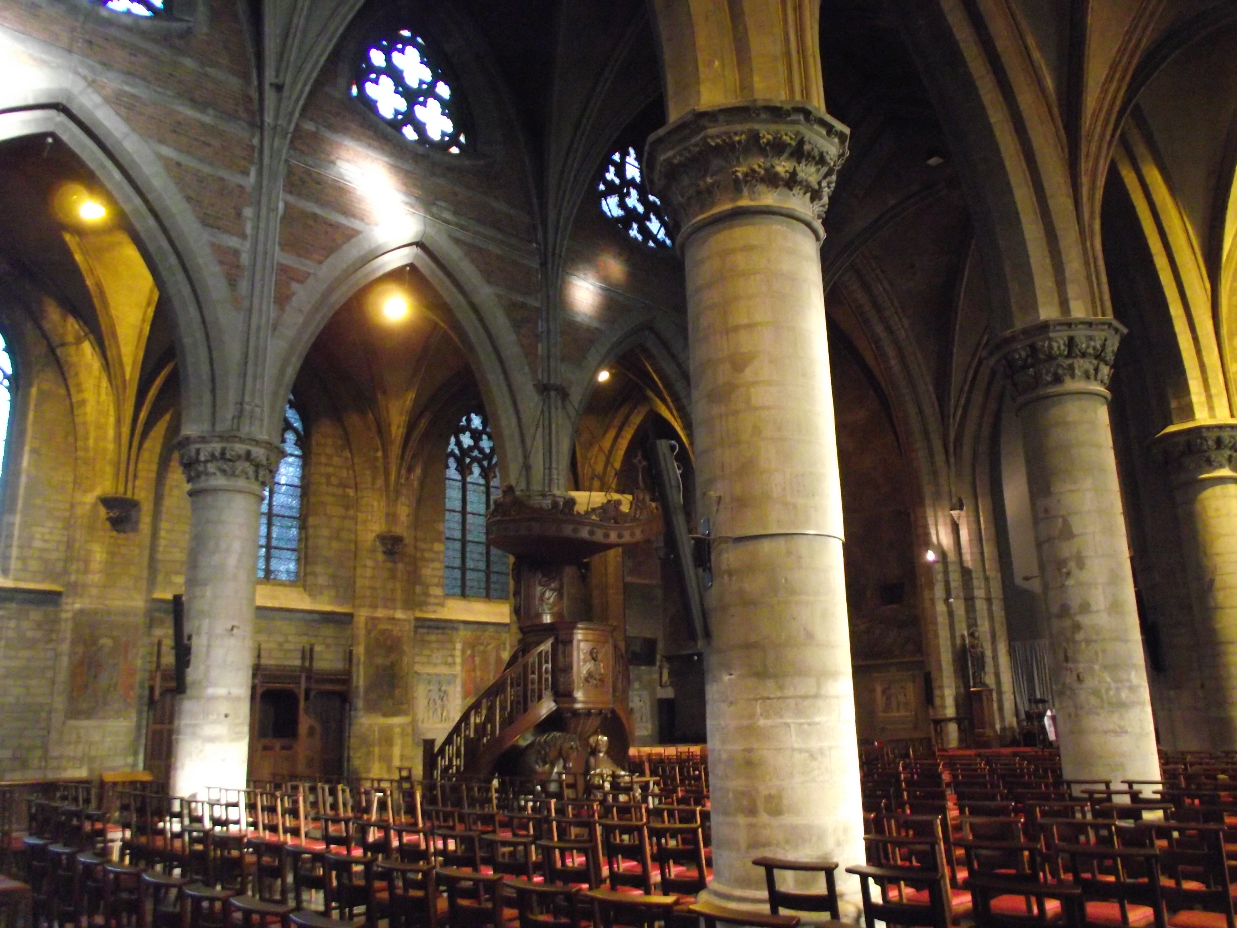 Anderlecht, Collegiata dei Santi Pietro e Guido, 1350-1527